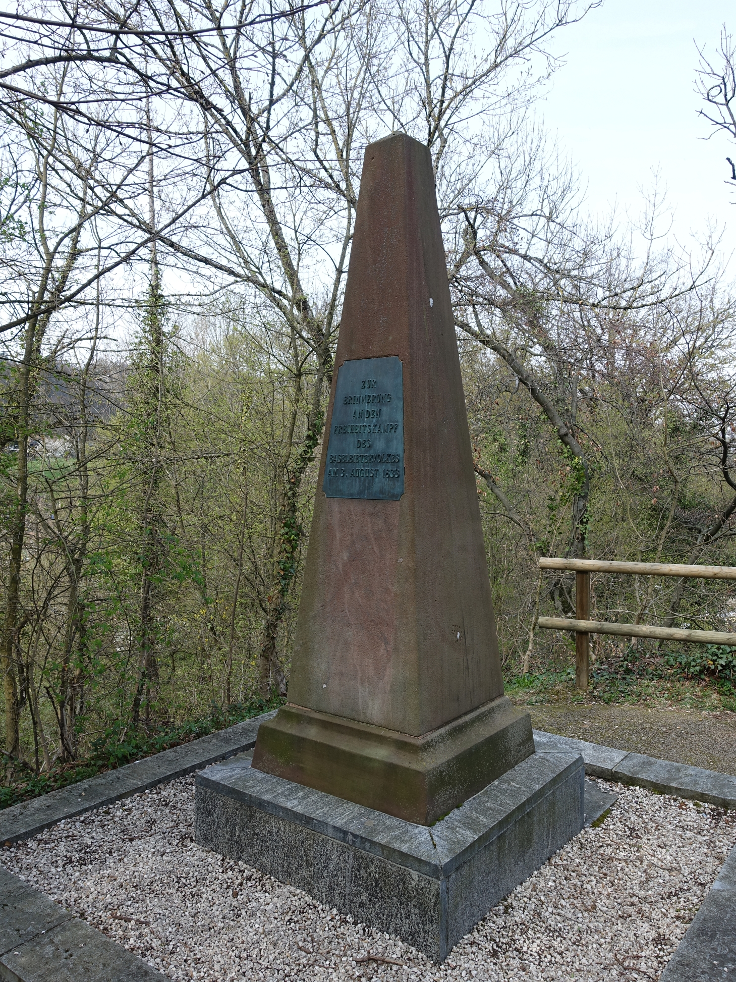 Hülftenschanz Denkmal, Inschrift Zur Erinnerung an den Freiheitskampf des Baselbieters Volkes am 3. August 1833. Am Hülftenschanz Denkmal Sockel ist folgende Inschrift zu sehen. An dieser Stelle brach Samstag den 3. August 1833 um die Mittagszeit der Ansturm der Basler Standestruppe unter blutigen Verlusten zusammen. Jhren Sieg nützen die Landschäftler Schützen durch rücksichtsloses Verfolgen des geschlagenen Gegners bis an die Birs aus. Hülftenschanz Denkmal obere Inschrift: Auf diesem Platze fiel Dr. Heinrich Hug Obergerichtsschreiber. Im Tode Ehrenbürger des Kantons Basellandschaft. Die Freiheit war seine Braut für sie ging er gerne in den Tod. Weiter viel hier.